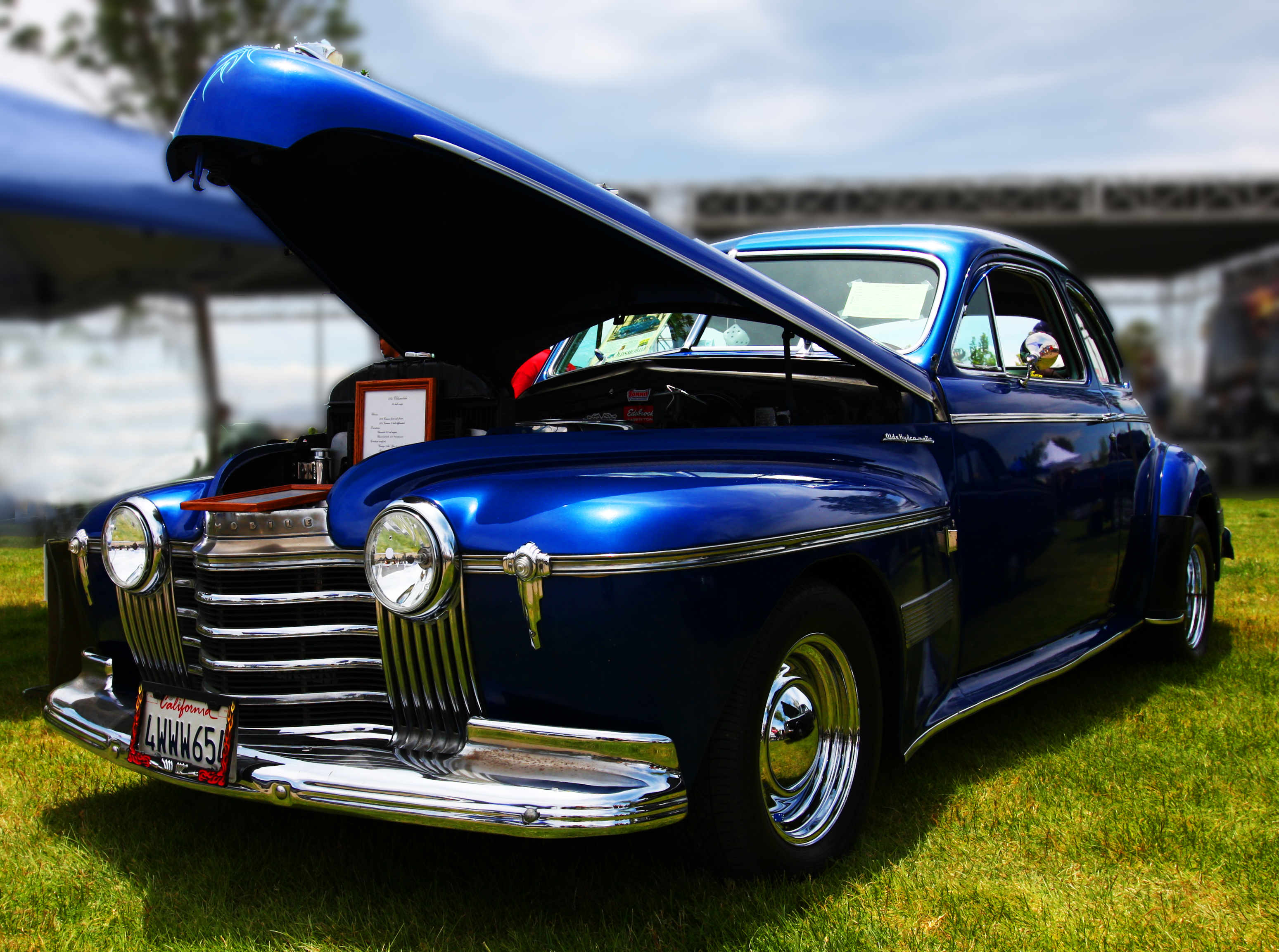 1941 Oldsmobile 96 Club Coupe